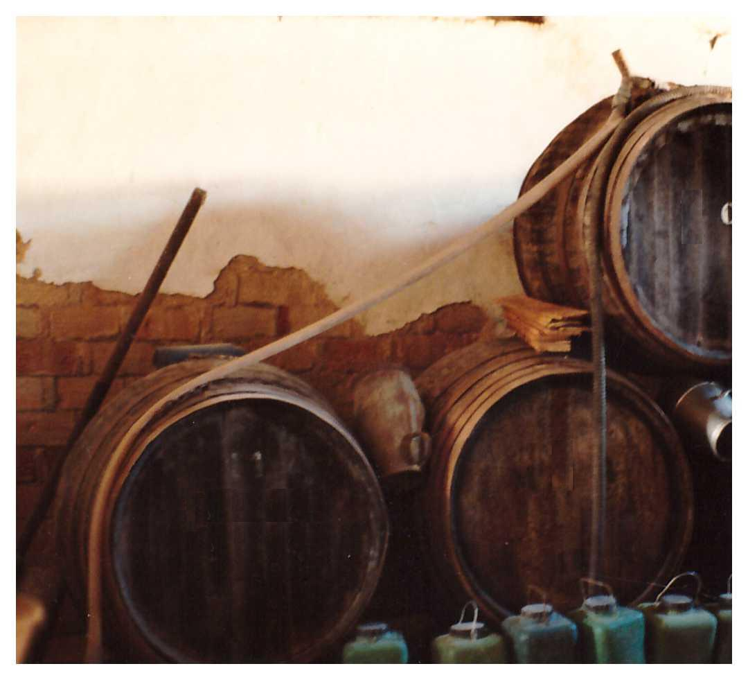 Bocoys apilados de una bodega de Huelva